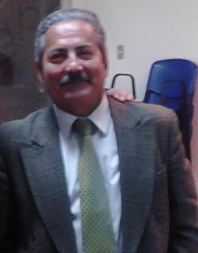 Armando Valdés Garrido, conocido como "Cabo Valdés", chileno que protagonizó un famoso caso de abducción ofológica en 1977.